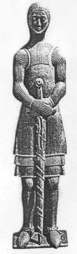 Beschreibung: lebensgroße Holzstatue aus dem mutmaßl. 13. Jahrh., vermutlich des Helmoldus de Plesse (Helmold (III.) von Plesse(n)) Datum: ca. 13. Jh. Urheber: Unbekannter Holzschnitzer Quelle: Vorlage aus: "Mecklenburgische Volks-Zeitung" aus 1990